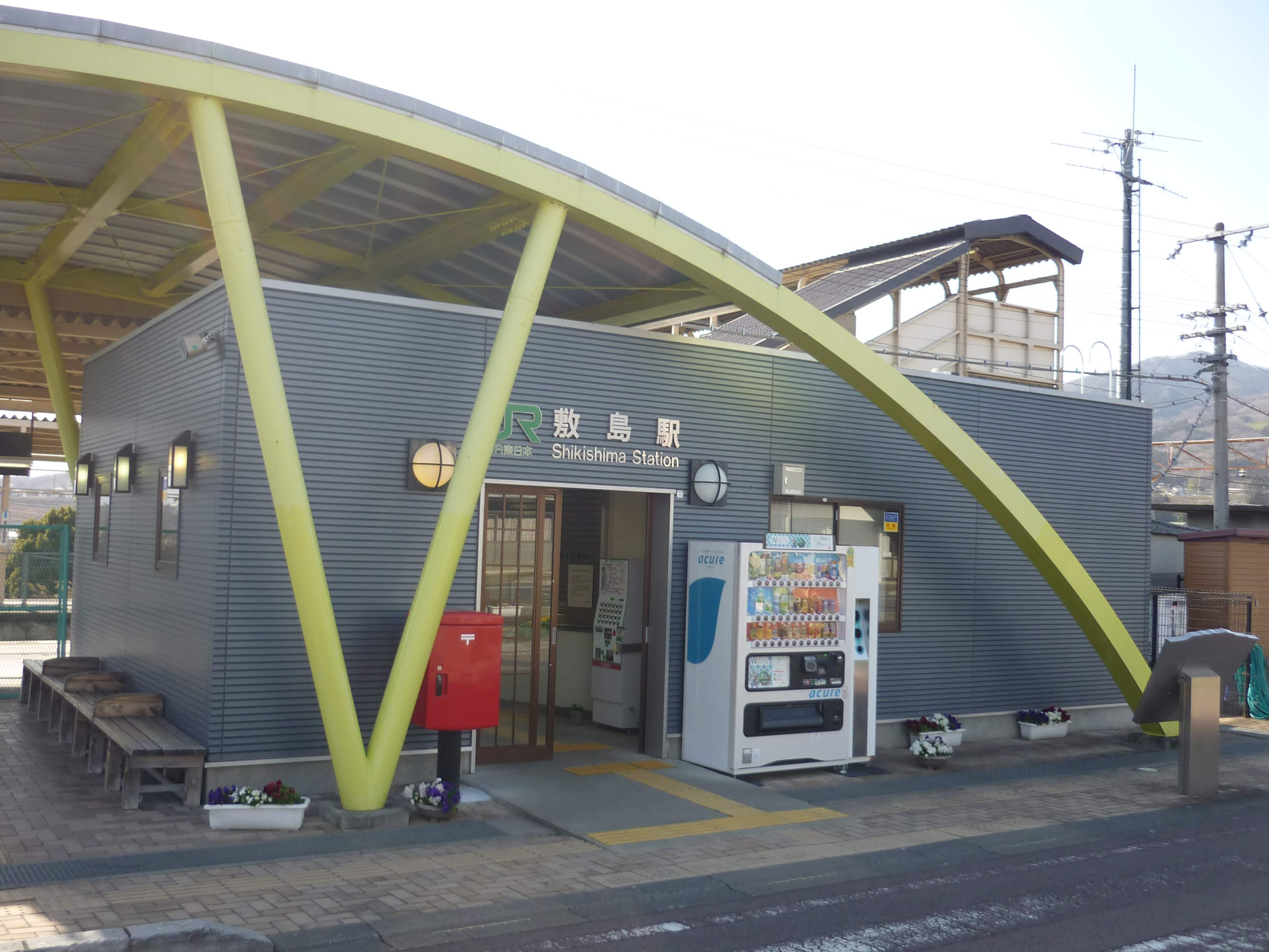 敷島駅駅舎